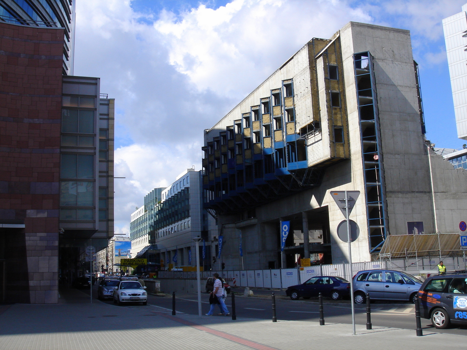 wyburzanie budynku usługowego City Center pod budowę wieżowca " Złota 44"